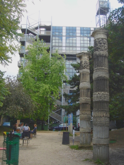 Jardin de l'Ecole Spéciale d'Architecture à Paris en France, avec au fond l'École Camondo.